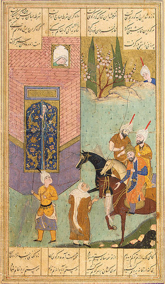 Султан Санджар и старуха.